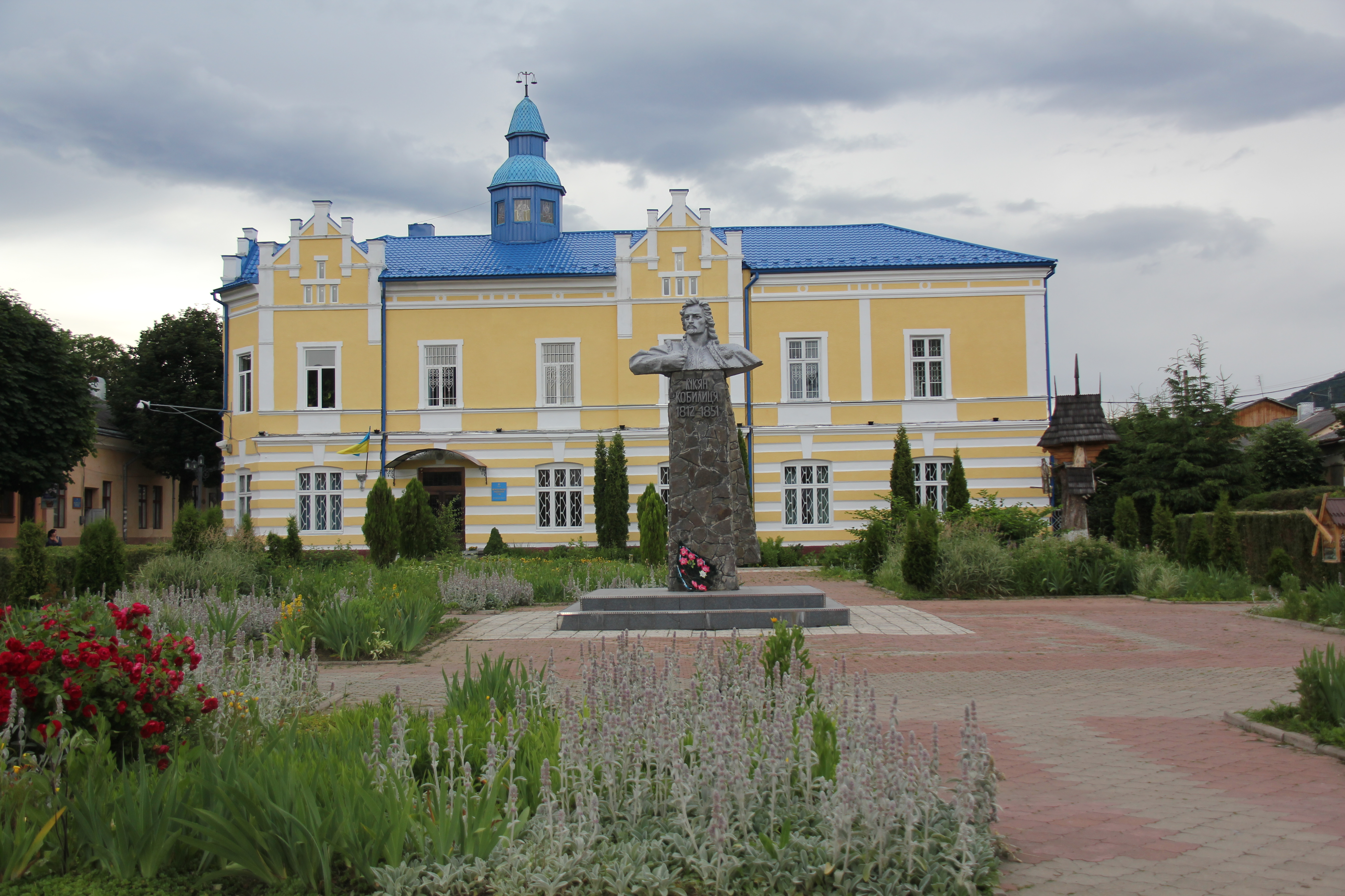 Памі'ятнику Лук'яну Кобилиці на фоні міської ради Вижниці.